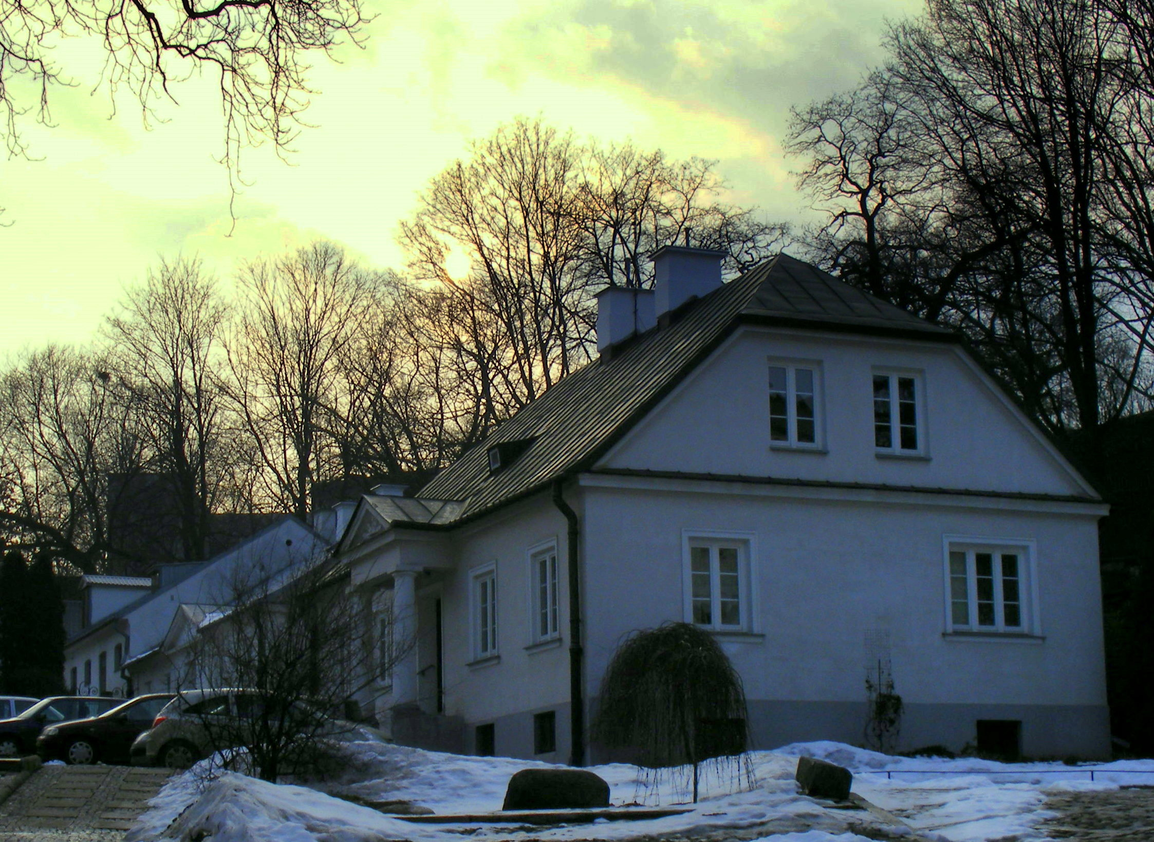 budynek mieszkalny dla księdza kapelana przy klasztorze sióstr Szarytek w Warszawie